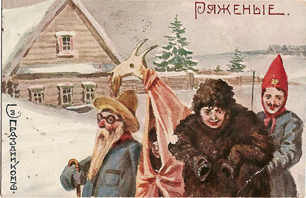 Русская открытка до 1917 года. В литографии Кушнерев и компания.